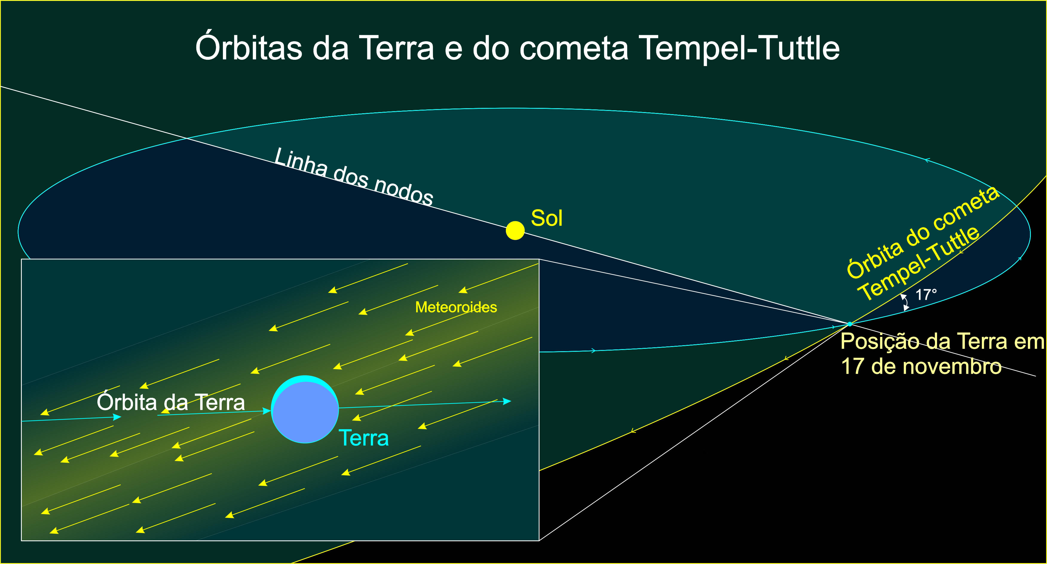 Este diagrama representa a órbita do cometa Tempel-Tuttle que cruza com a Terra. No dia 17 de novembro o planeta passa nesse ponto e cruza com os detritos deixados pelo cometa, dando origem à chuva de meteoros Leônidas.